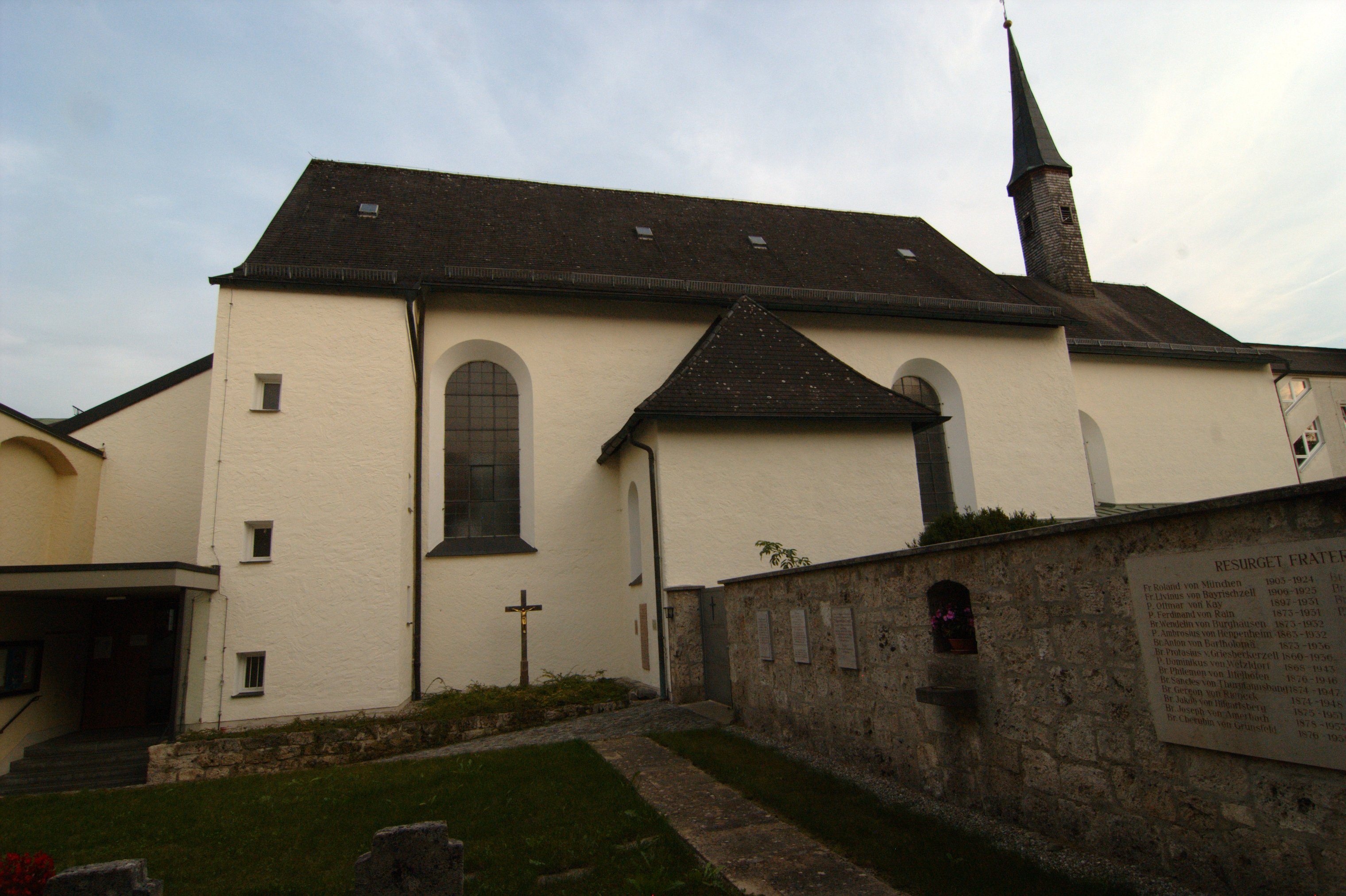 Kapuzinerkirche St. AnnaThis is a photograph of an architectural monument.